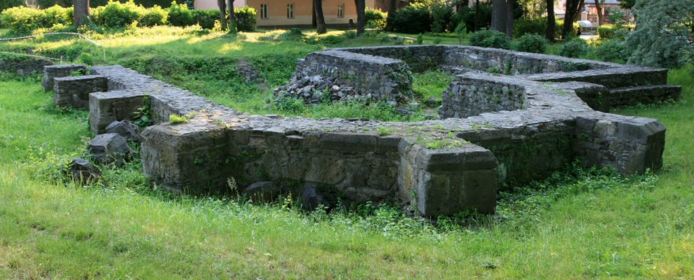 Фундаменты церкви на территории Ужгородского замка